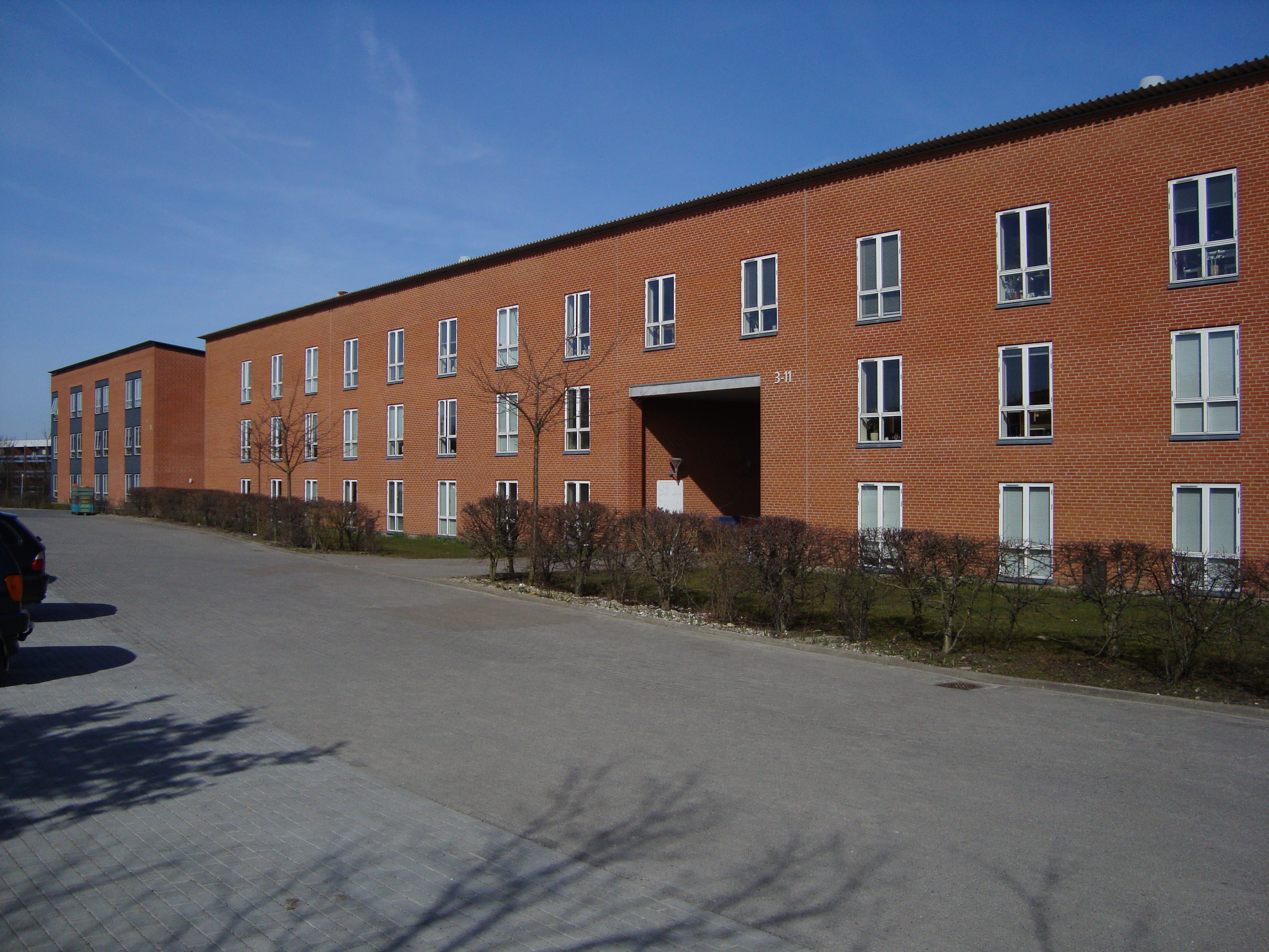 Skelagerkollegiet i Århus